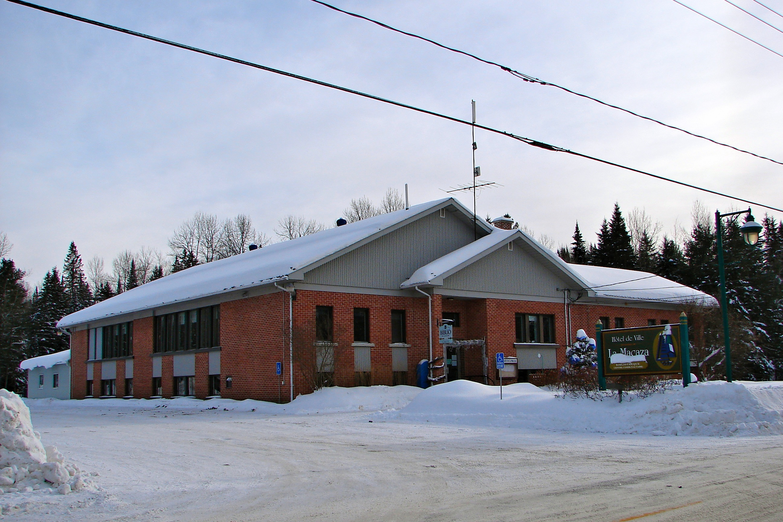 La Macaza, Quebec, Canada